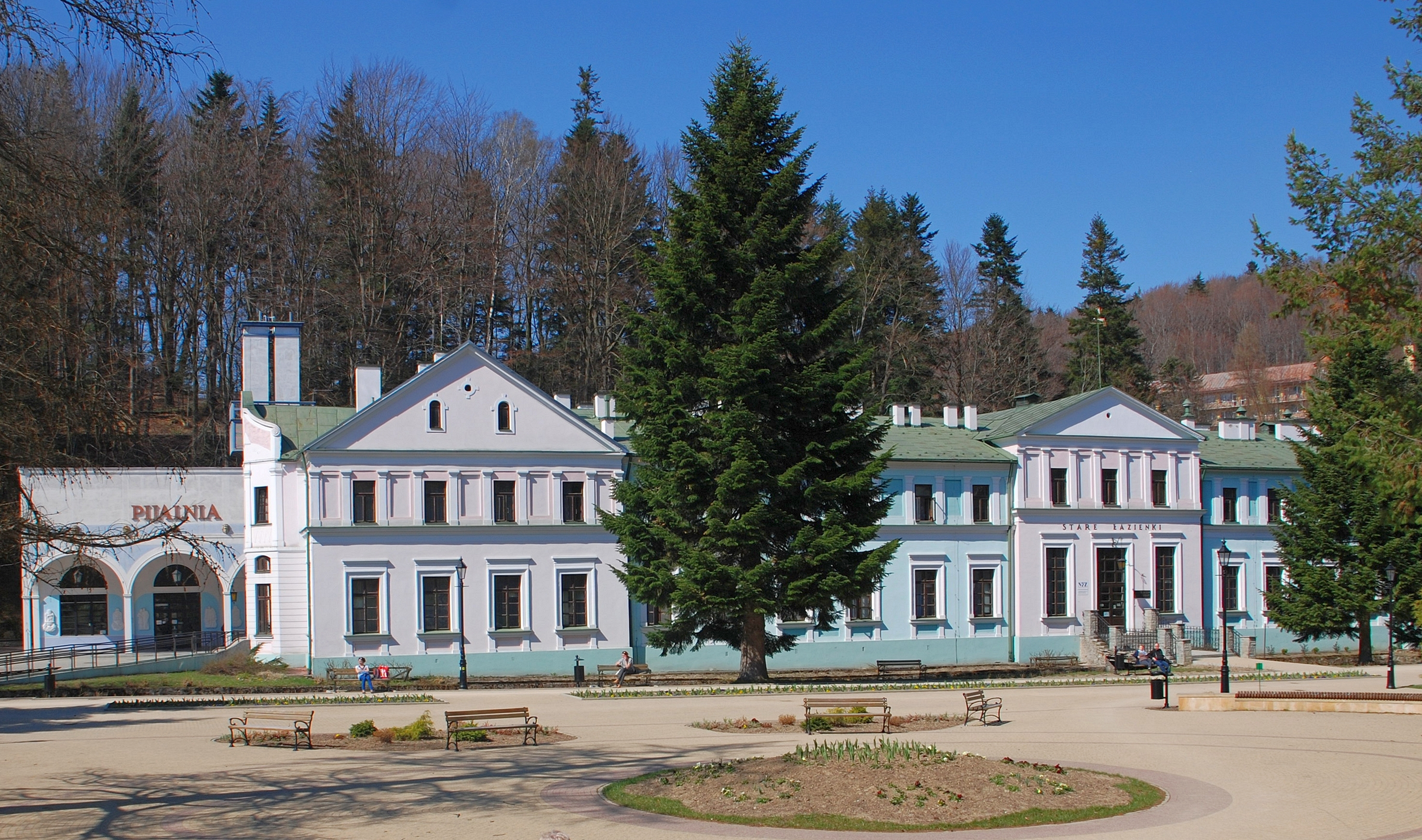 miasto Iwonicz-Zdrój